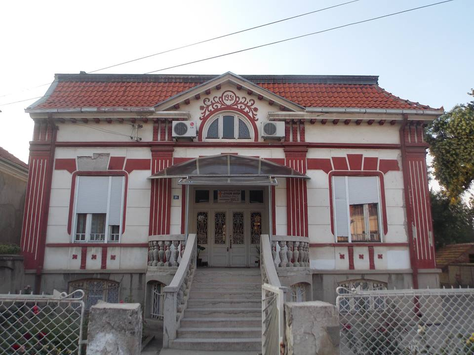 Протестантска еванђеоска црква „Заједница Рома“ у Лесковцу